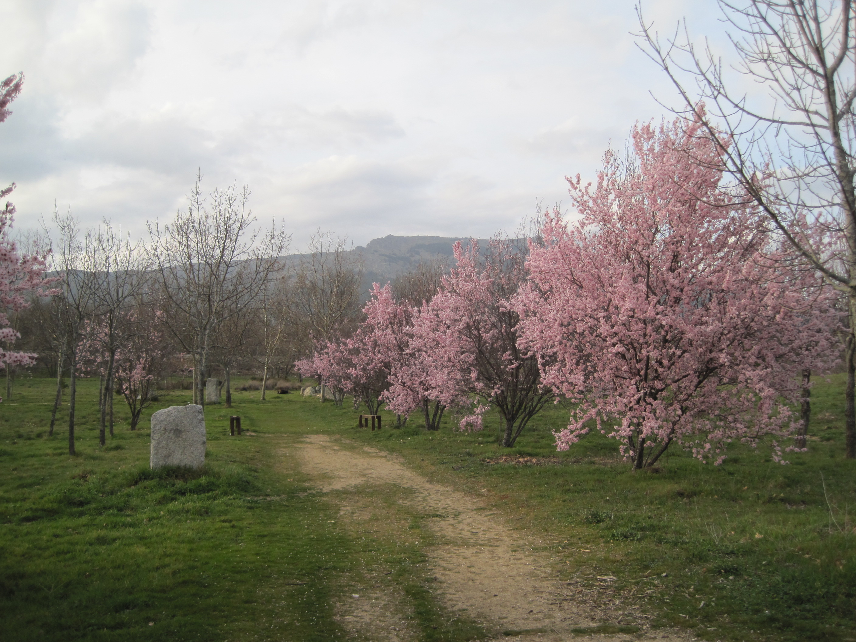 Parque de La Manguilla, en El Escorial (Madrid, España).